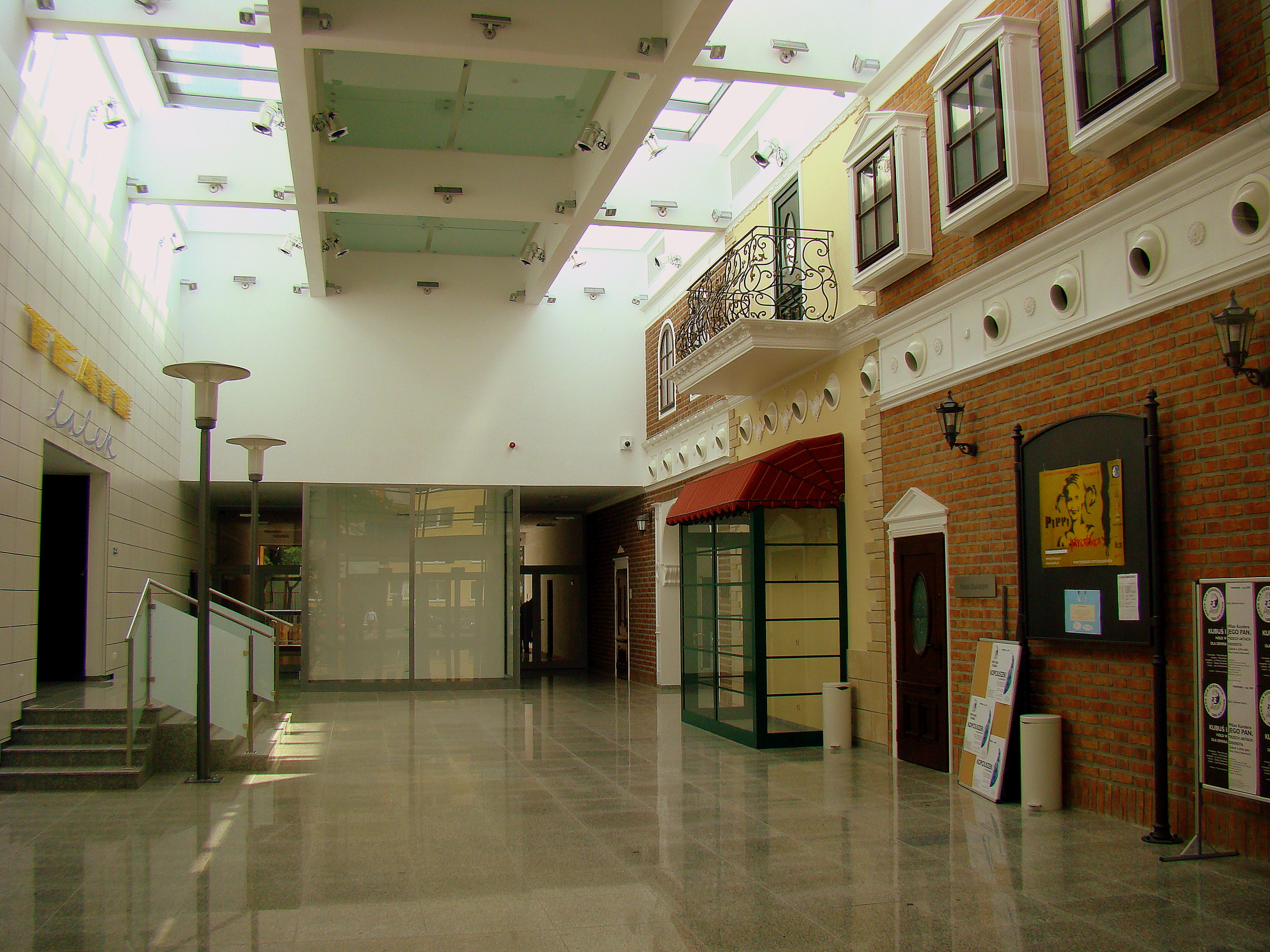 Teatr Lalek Pleciuga (hol główny), Szczecin, Polska